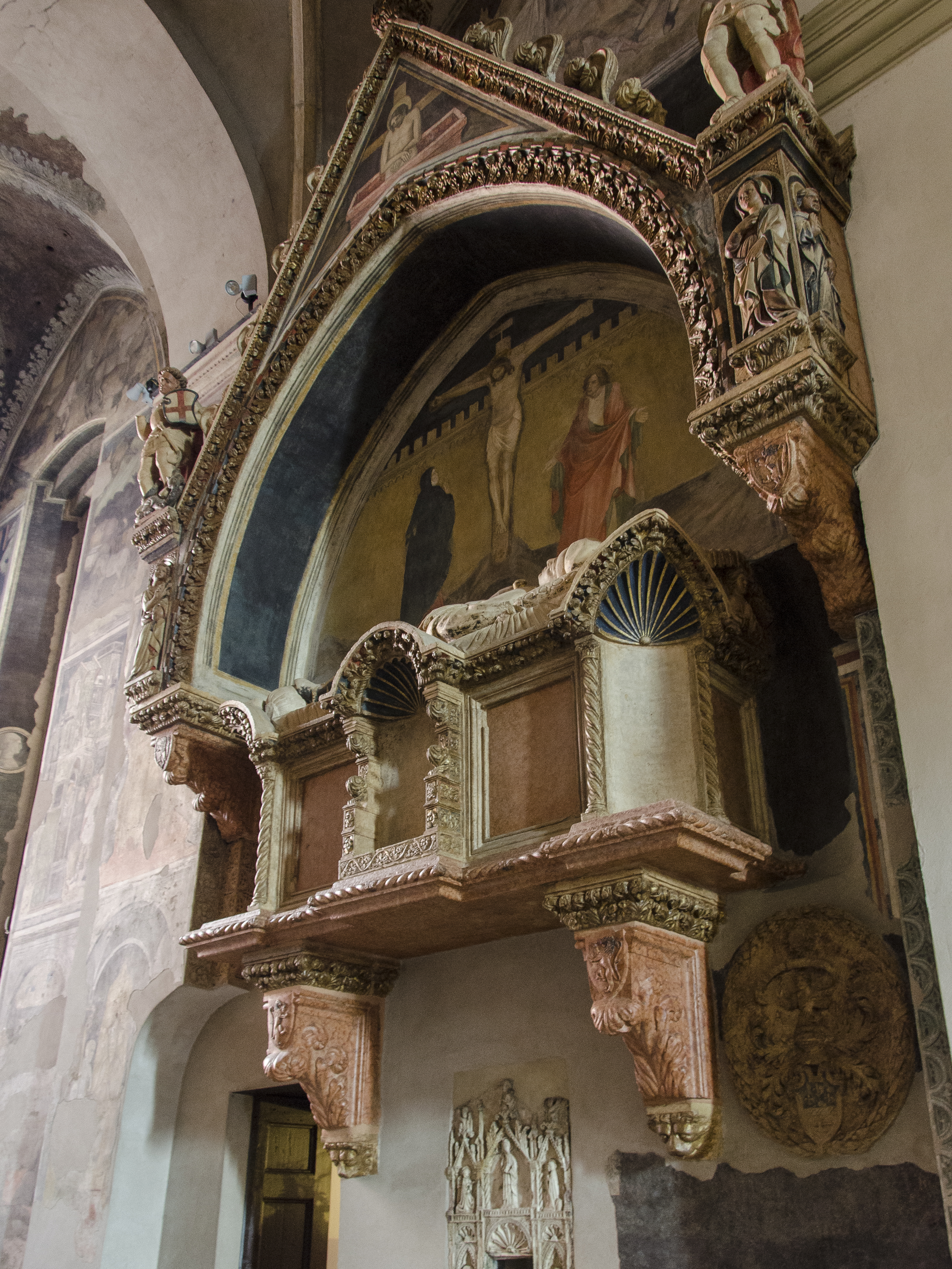 Cappella Guantieri nella chiesa di Santa Maria della Scala, a Verona